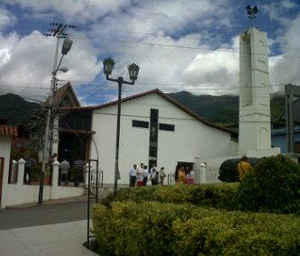 El exterior del templo